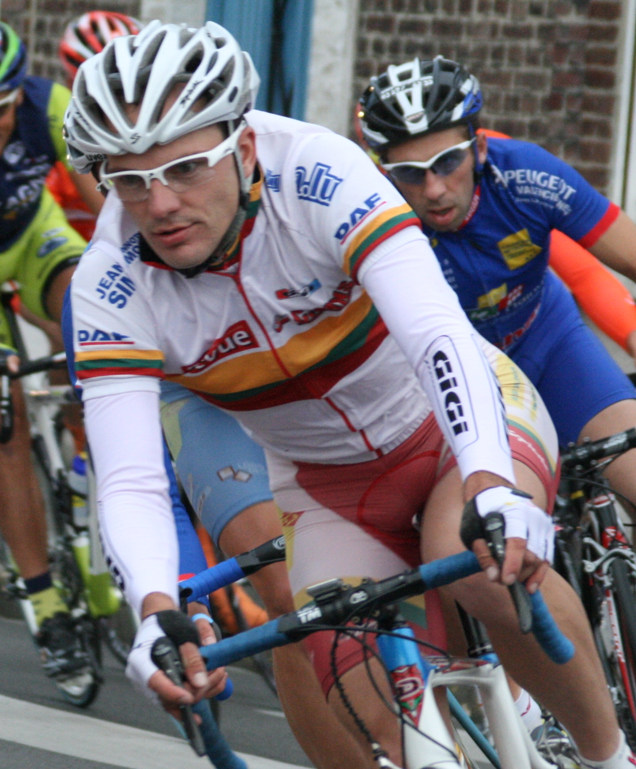 Vytautas Kaupas lors du Guidon d'or hellemmois 2010